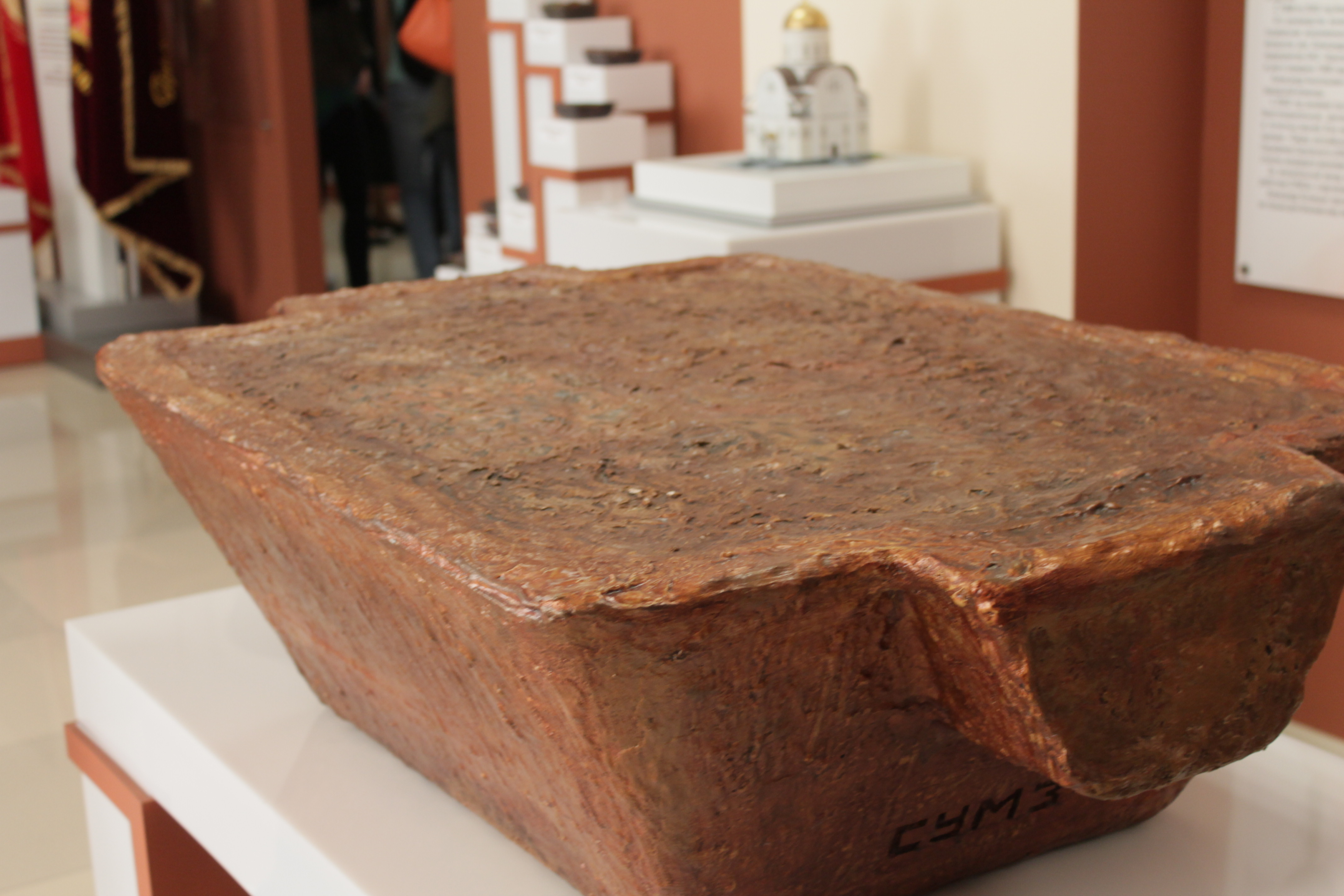 СУМЗ. Черновая медь в Музеи Трудовой славы